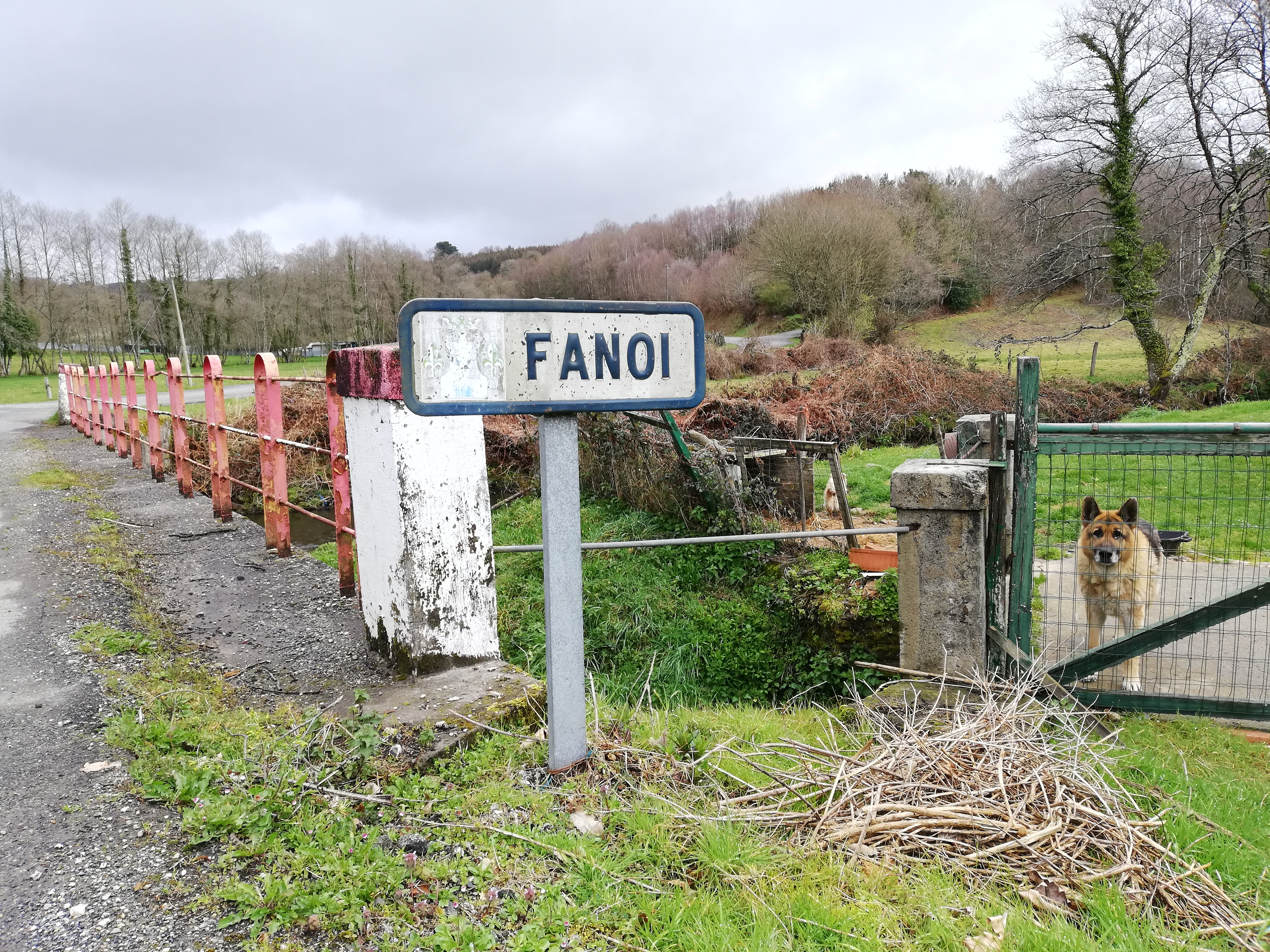 Sinal en Fanoi, Abadín.